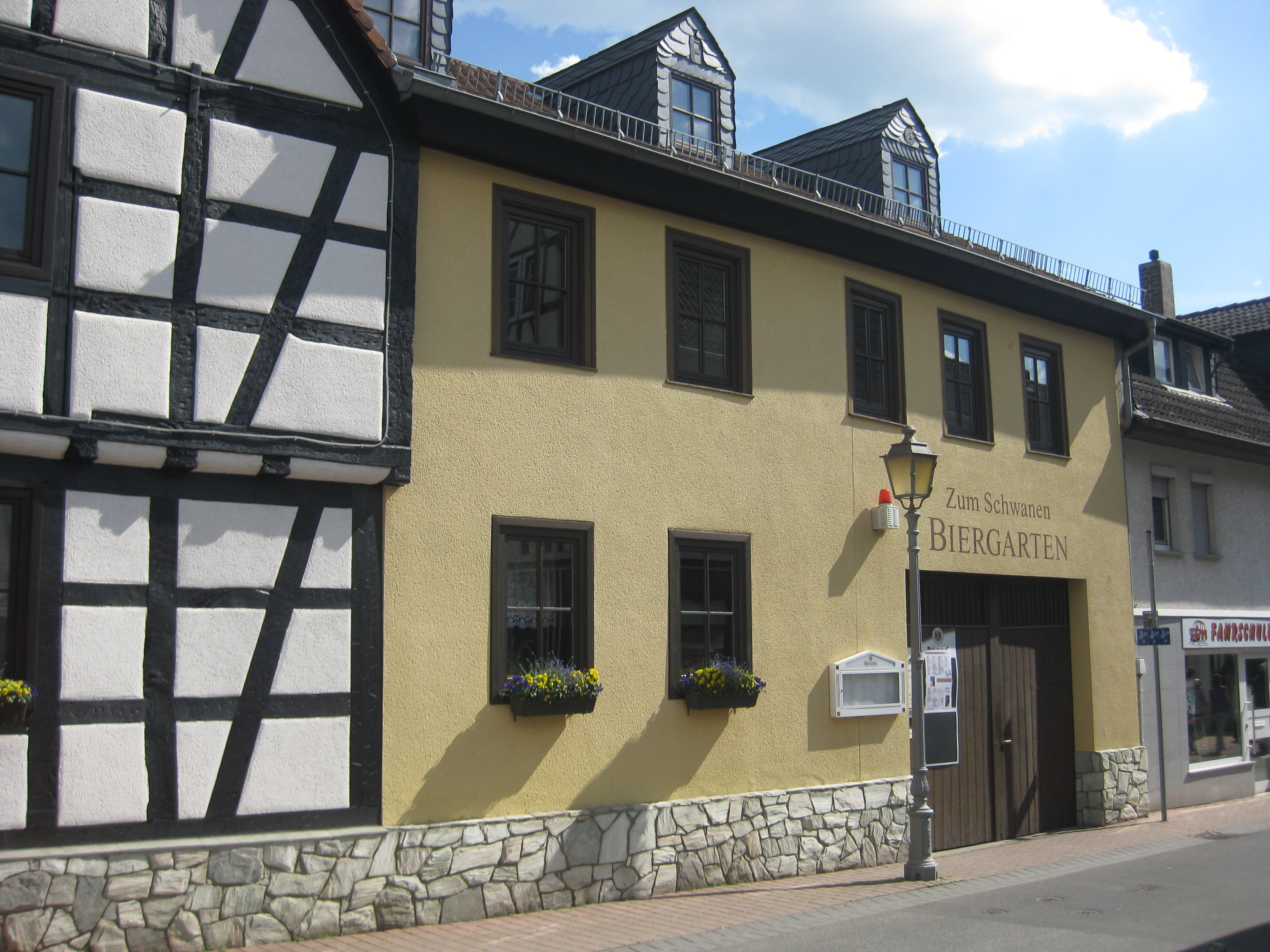 Schwalbach am Taunus, Gasthaus zum Schwanen